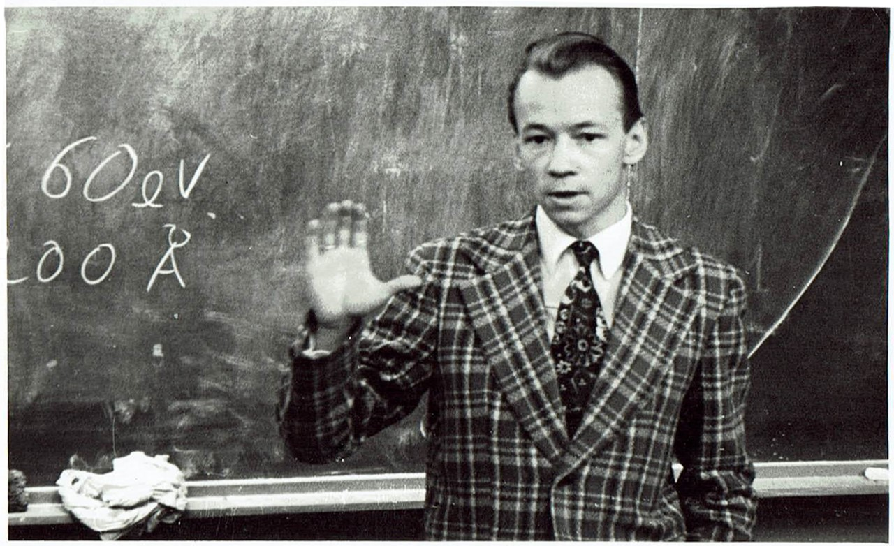 Mart Elango 1970ndate teises pooles